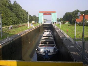 Sluis Twentekanaal (laag), eigen foto Categorie:Afbeelding schip